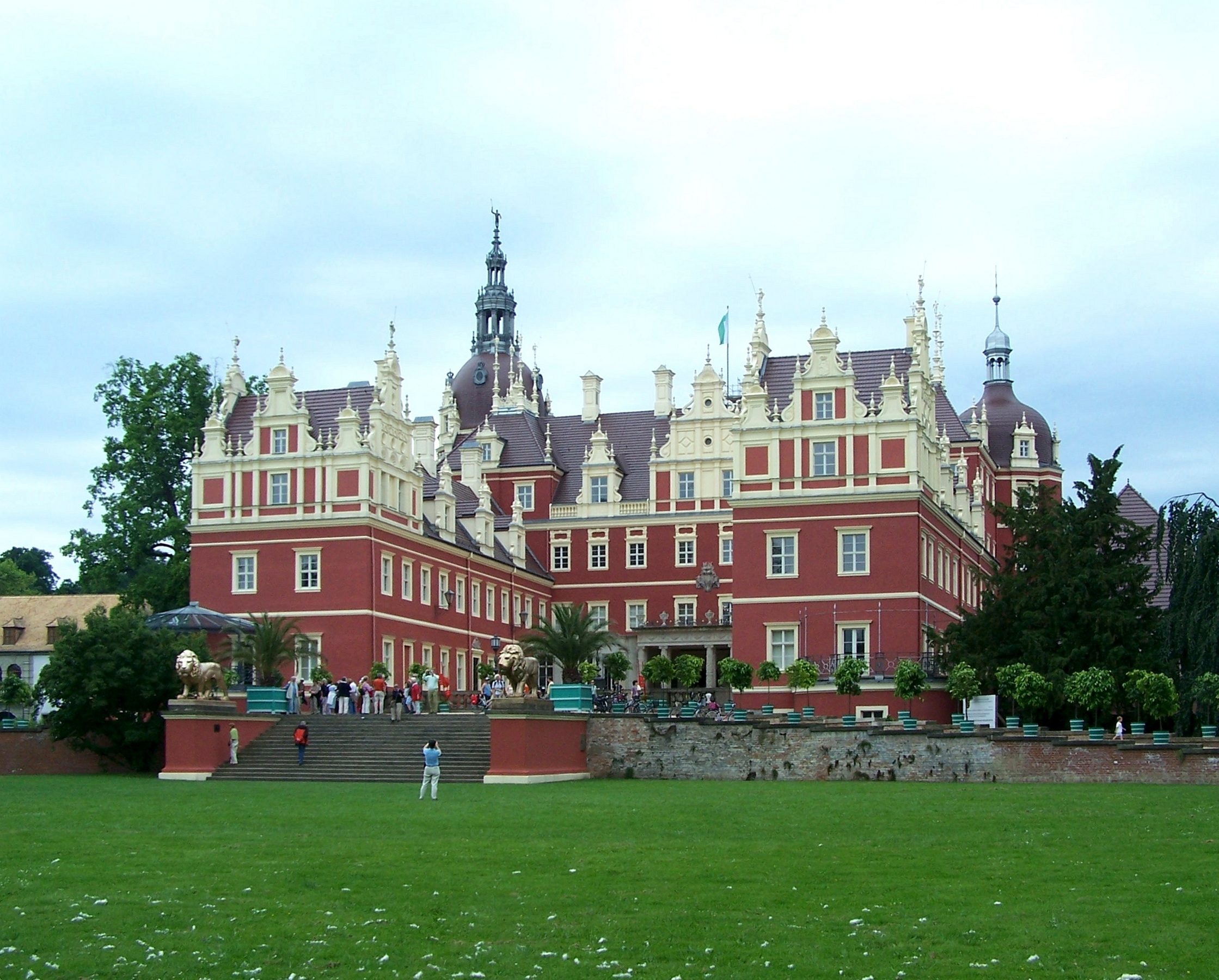 Schloss Muskau in Bad Muskau, Landkreis Görlitz